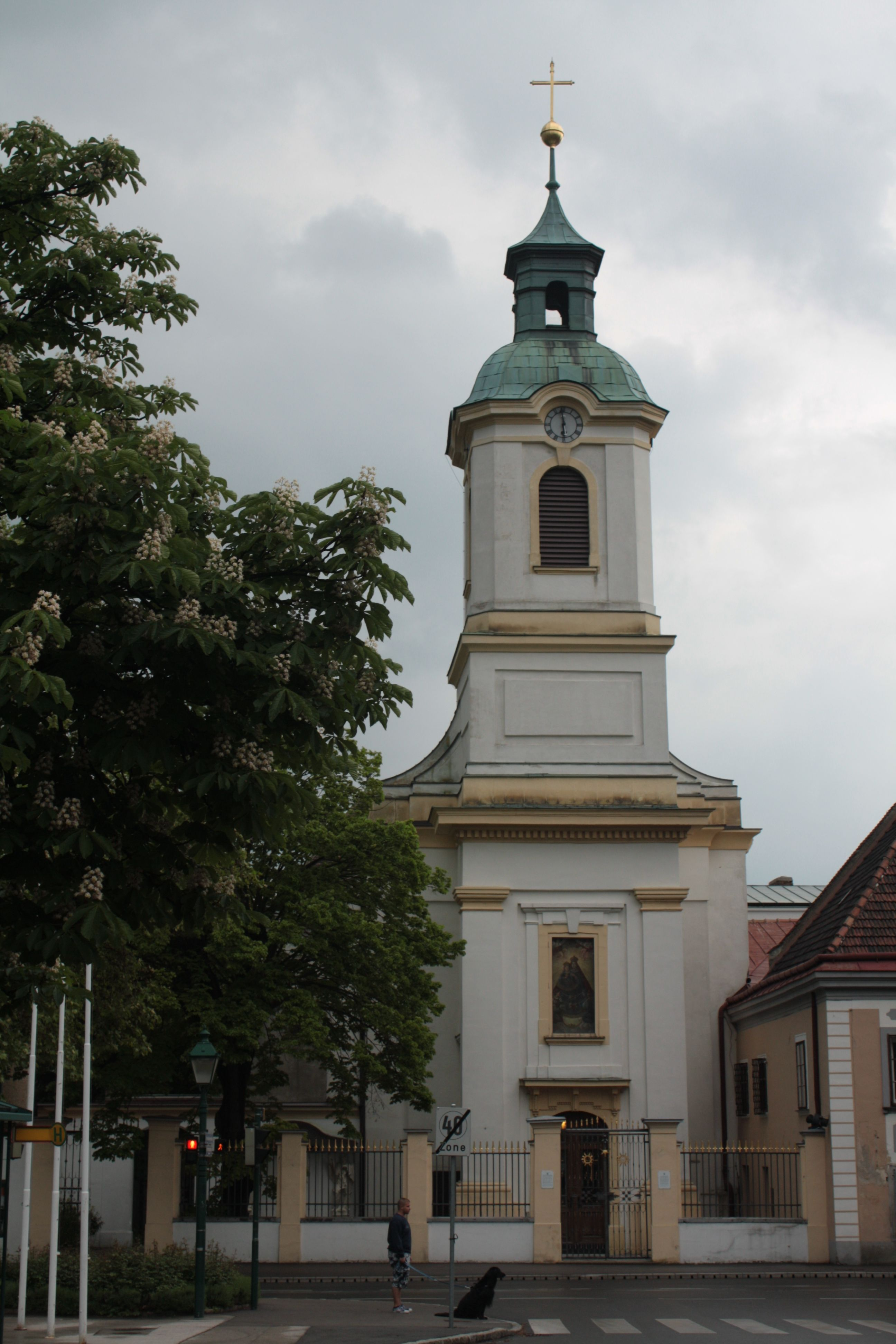 Franziskanerkloster in Maria Enzersdorf in Niederösterreich